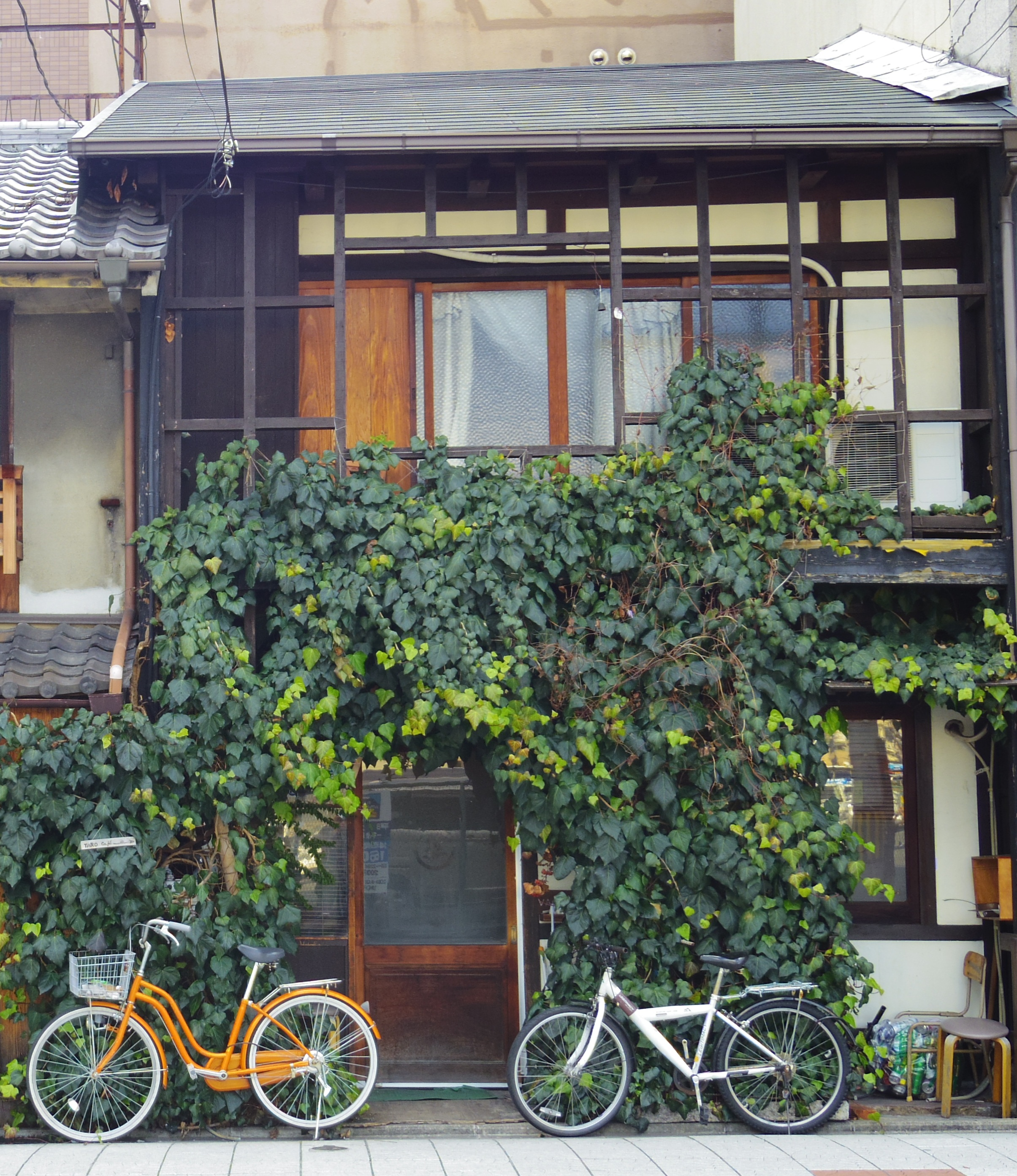 2012年12月撮影